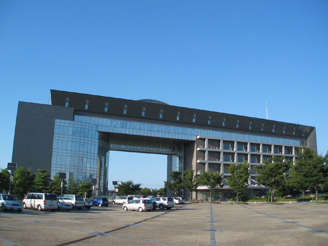 白山市役所 本庁舎 右側の棟が市役所本庁舎、左側の棟は白山市民交流センター。 合併により白山市が誕生する前までは、松任市の市役所だった。 撮影者 Shift 撮影日 2005年08月 撮影地 石川県白山市倉光二丁目